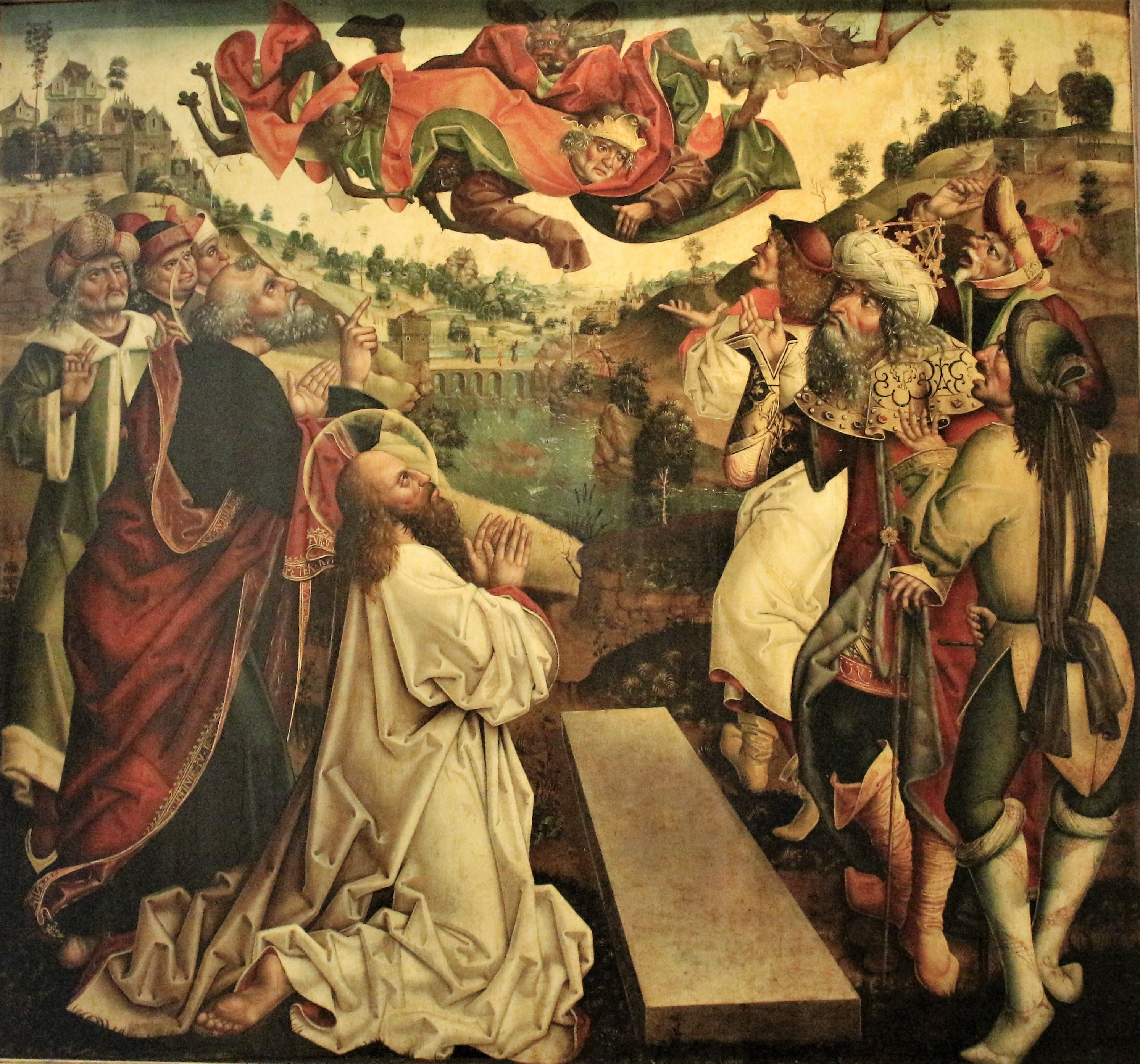 Altartafel